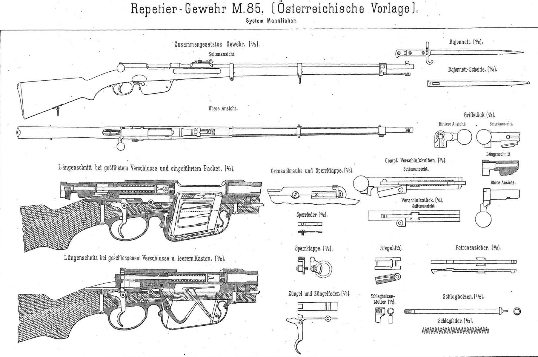 Skica avstrijske premovlečne repetrike Mannlicher M1885.